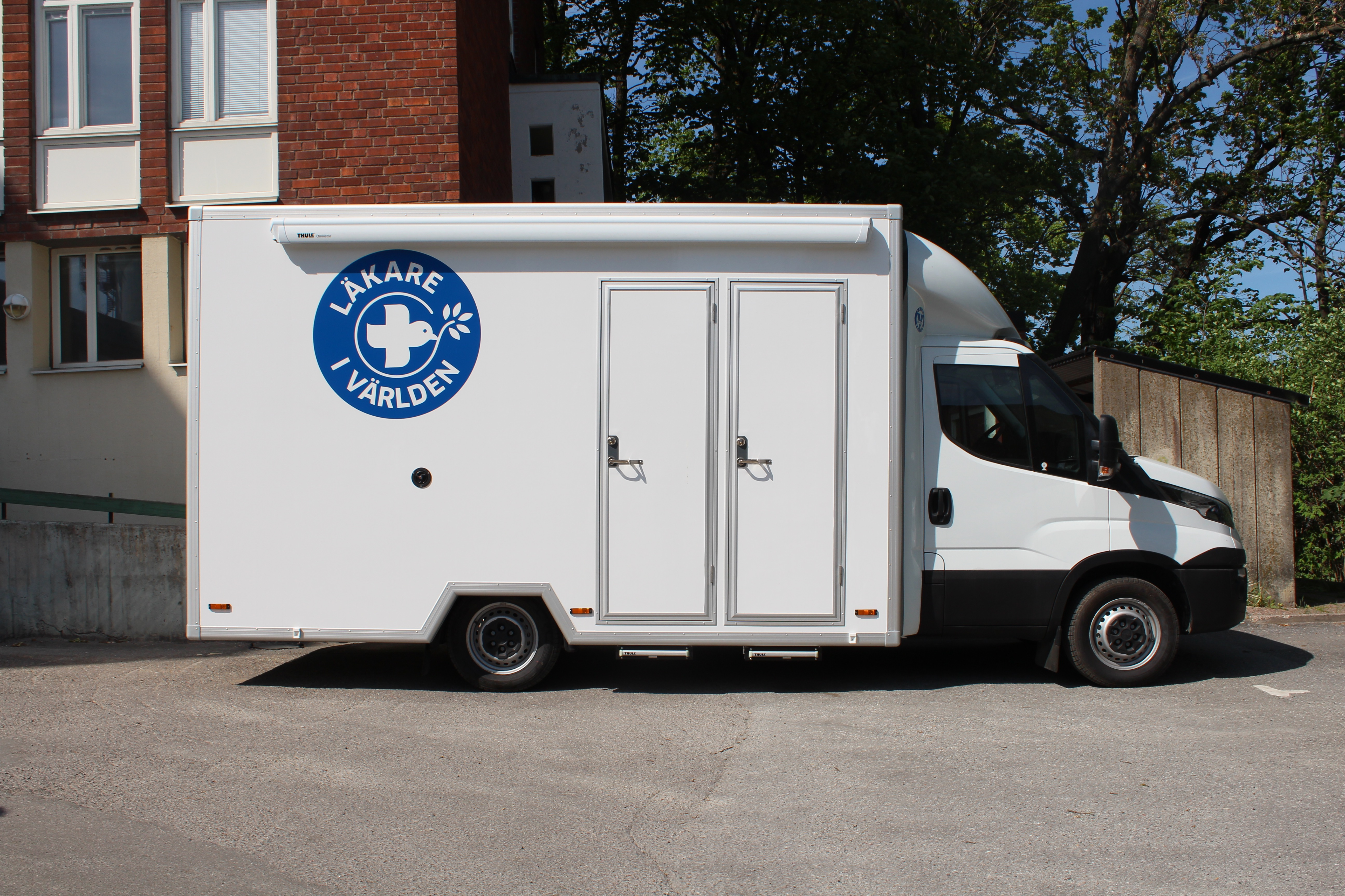 Läkare i Världens mobila vårdenhet i Stockholm.